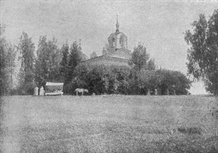 Кульневская церковь, куда в 1832 году был перевезен прах Я. П. Кульнева.